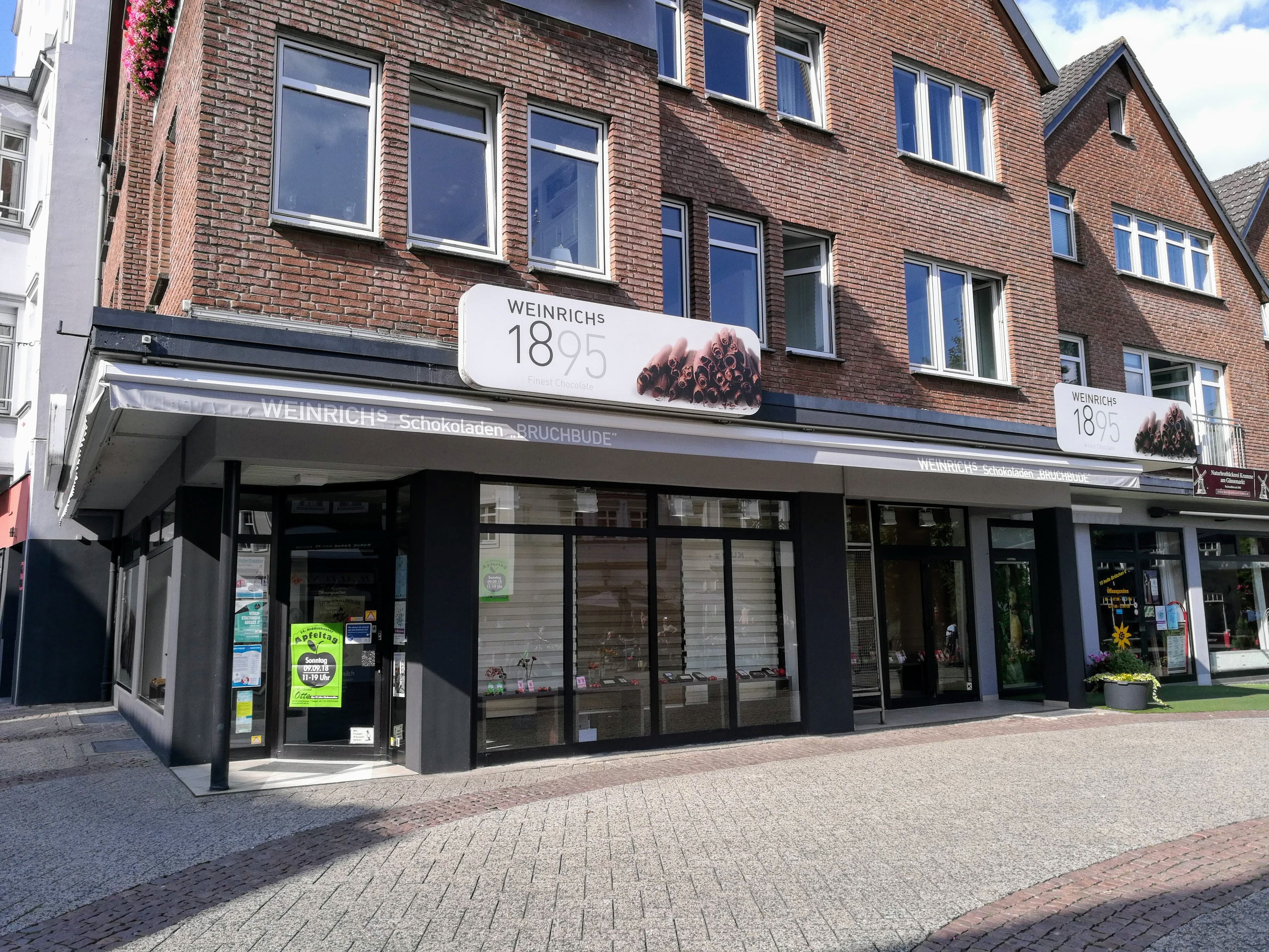 Weinrich Herford Bruchbude Schokoladen-Shop am Gänsemarkt